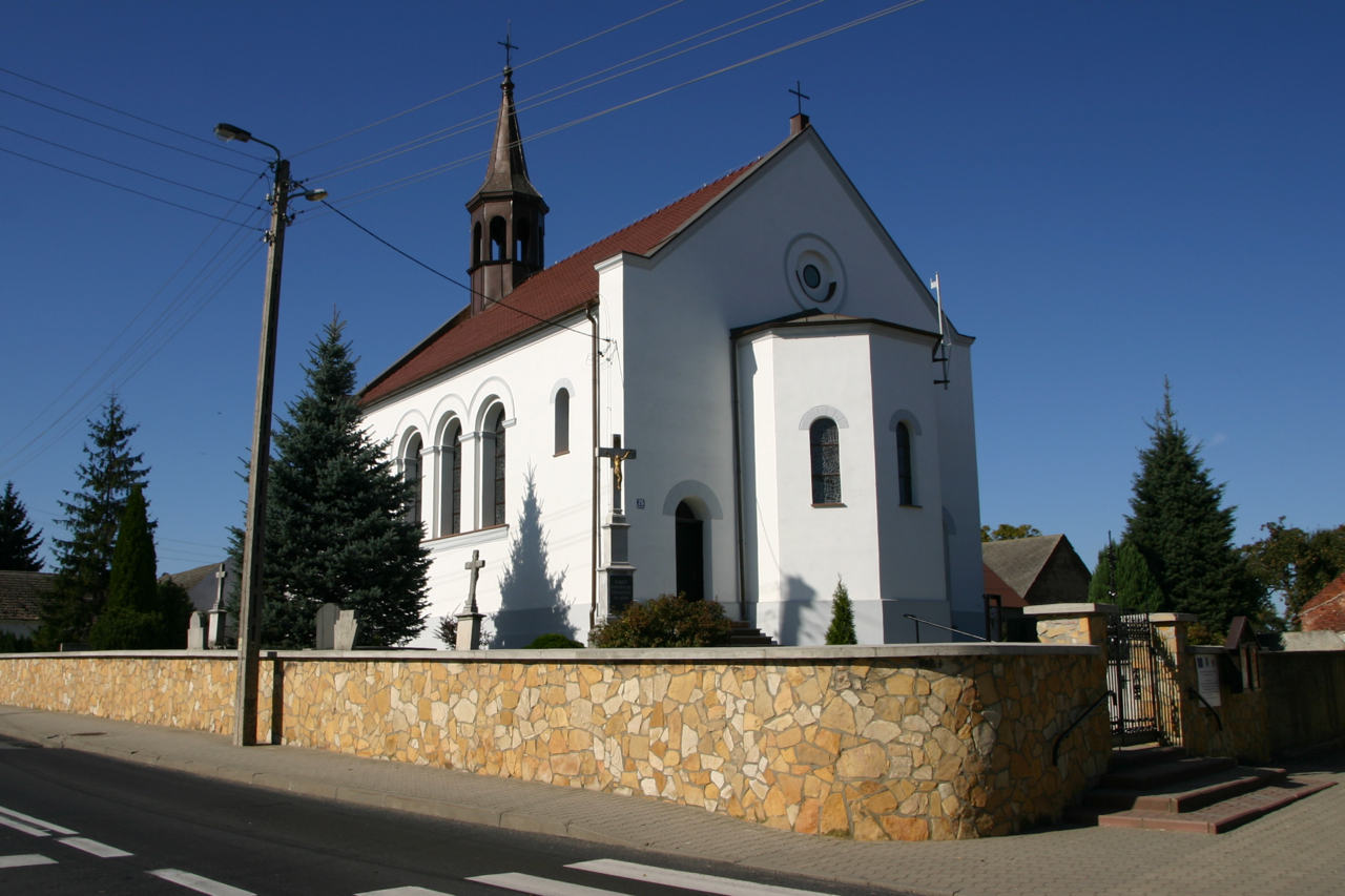 Stare Kotkowice - kaplica p.w. św. Barbary, obecnie kościół filialny, XVIII w. (zabytek nr 557/59 z 24.02.1959)